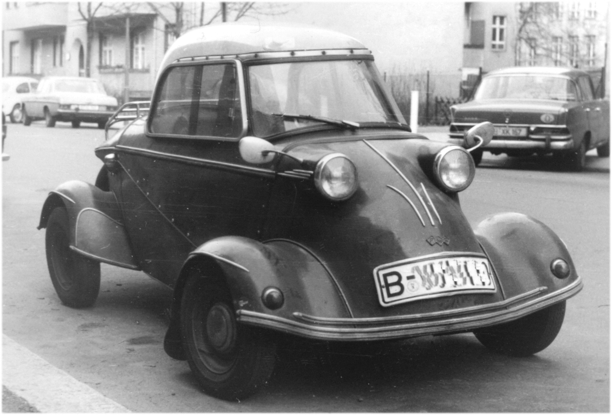 Messerschmidt Tg 500; das Fahrzeug hat das "FMR"-Logo Sonstiges: Das Fahrzeug wurde 1976 in Berlin aufgenommen.